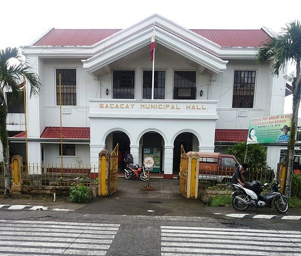 Bikol Central: Munisipyo kan Bacacay